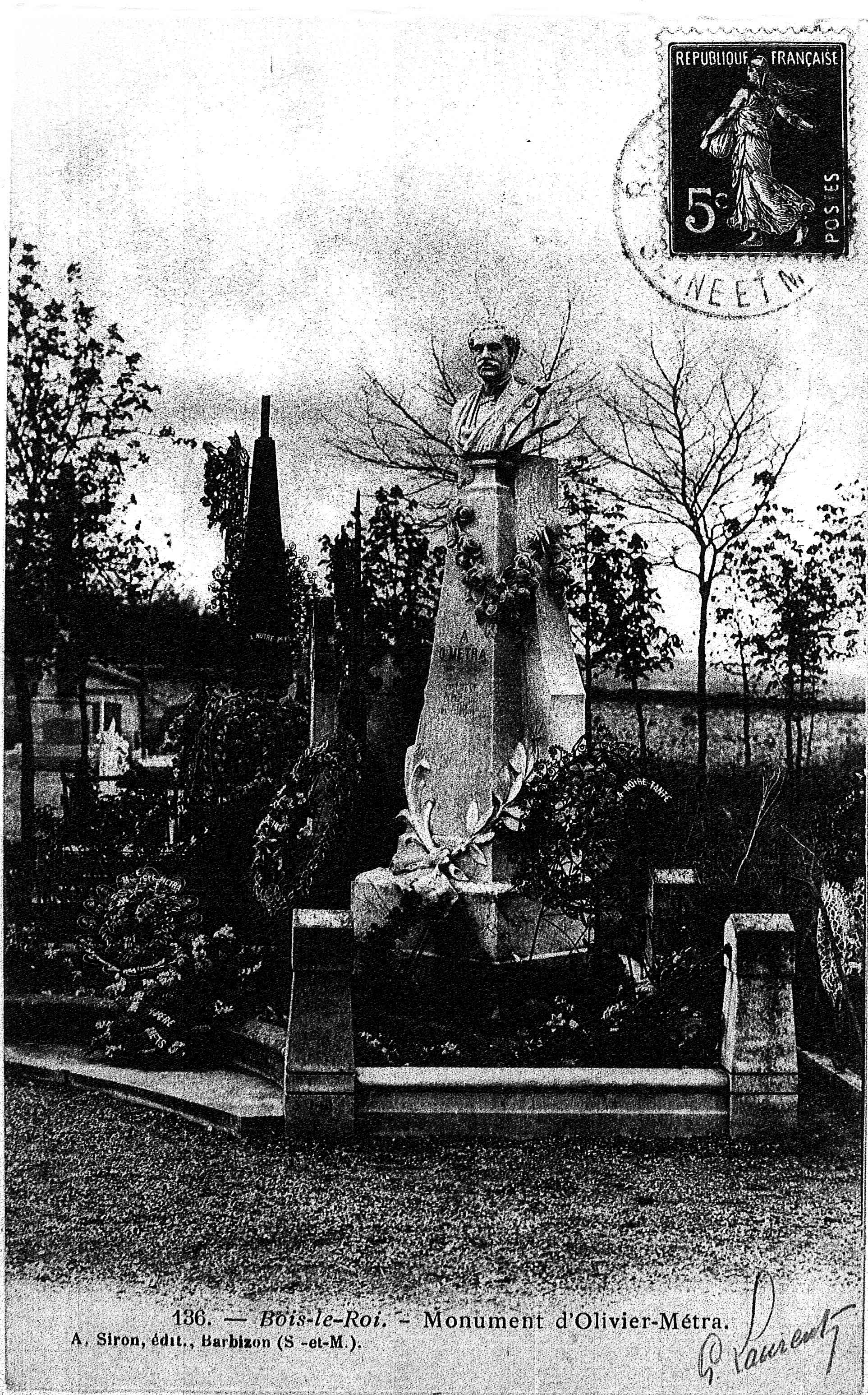 issu de "portrait de rémois" de la bibliothèque de Reims.